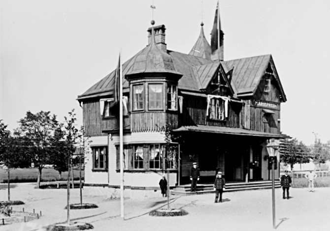 Mariefreds stationshus